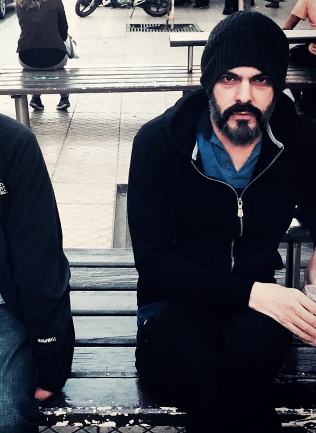 El escritor Mike Wilson en la Filba Internacional Santiago 2015, celebrada entre el 26 y el 29 de setiembre